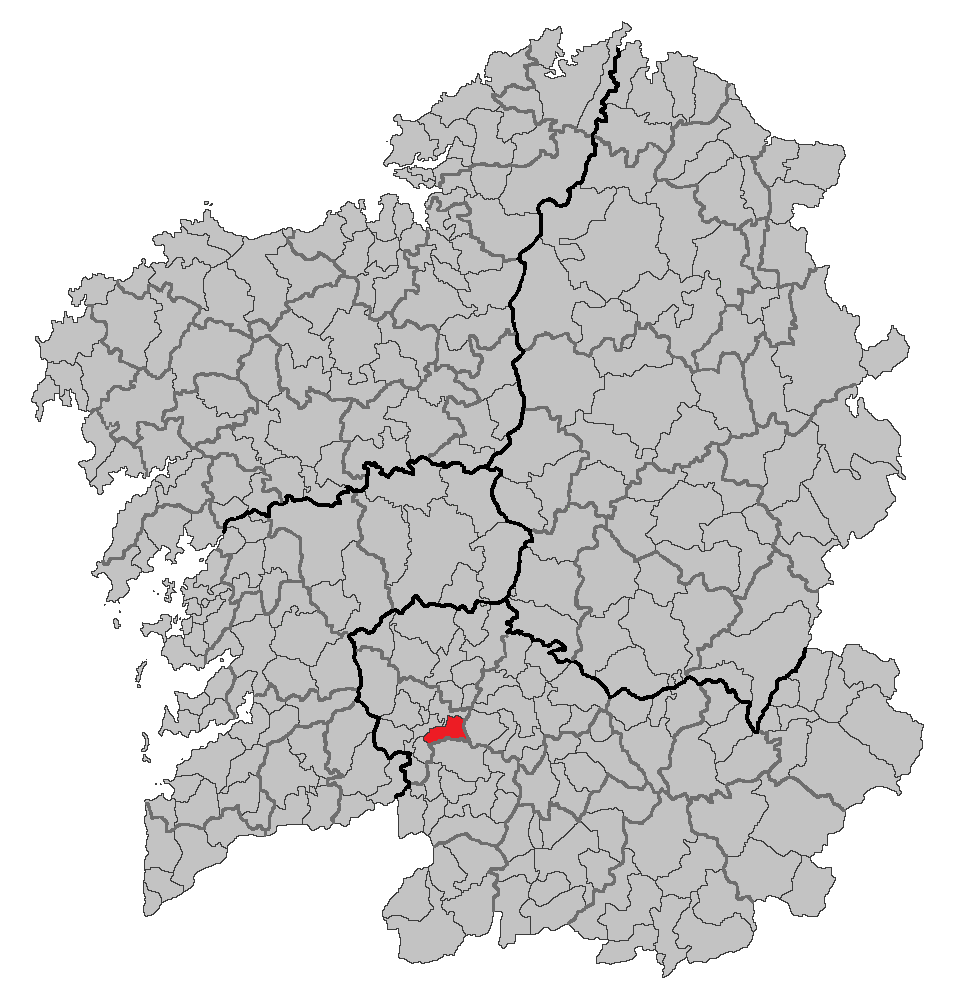 Mapa coa localización do concello de Castrelo de Miño.